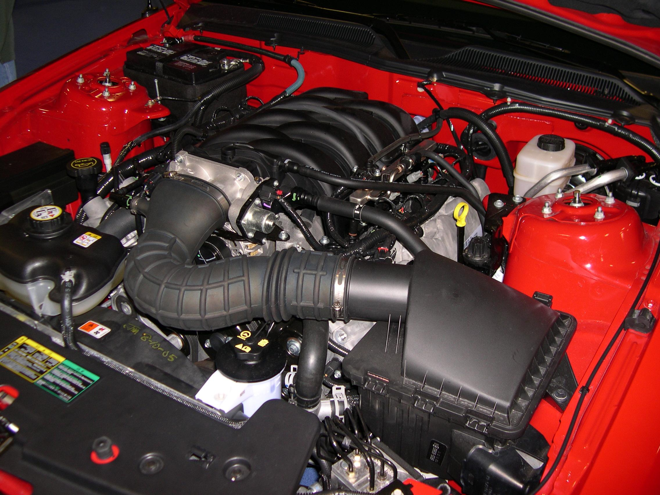 2006 Ford Mustang GT's SOHC 3-valve 4.6 L Modular V8 engine